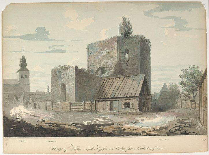 RAÄ-nummer Visby 55:1. Ruinen från nordost. Akvarellerad teckning från 1807 av Jacob Wilhelm Gerss. Motiv: Visby 55:1 Nyckelord: Raä-Fastigheter, Riksintressen, Världsarv Kategori: Akvarell, Kyrka/kapell RAÄ-nummer Visby 55:1. Ruinen från nordost. Akvarellerad teckning från 1807 av Jacob Wilhelm Gerss. Visby 55:1.